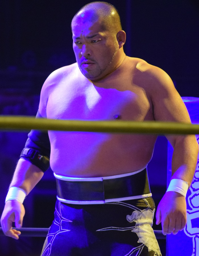 2016年2月11日 大阪府立体育会館 「THE NEW BEGINNING in OSAKA」 石井智宏